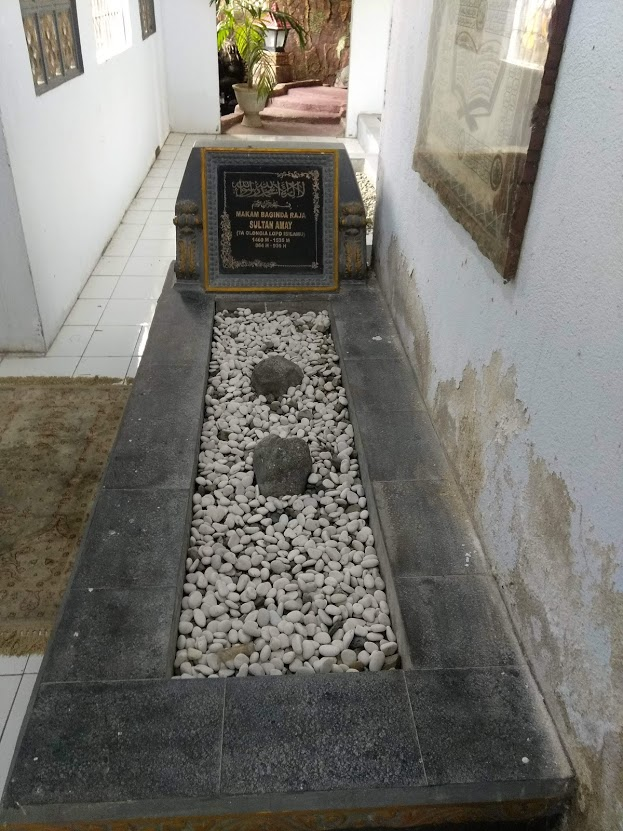 Makam Sultan Amay (Raja yang memerintah Gorontalo pada tahun 1460 - 1535) yang bertempat di kompleks Masjid Hunto Sultan Amay